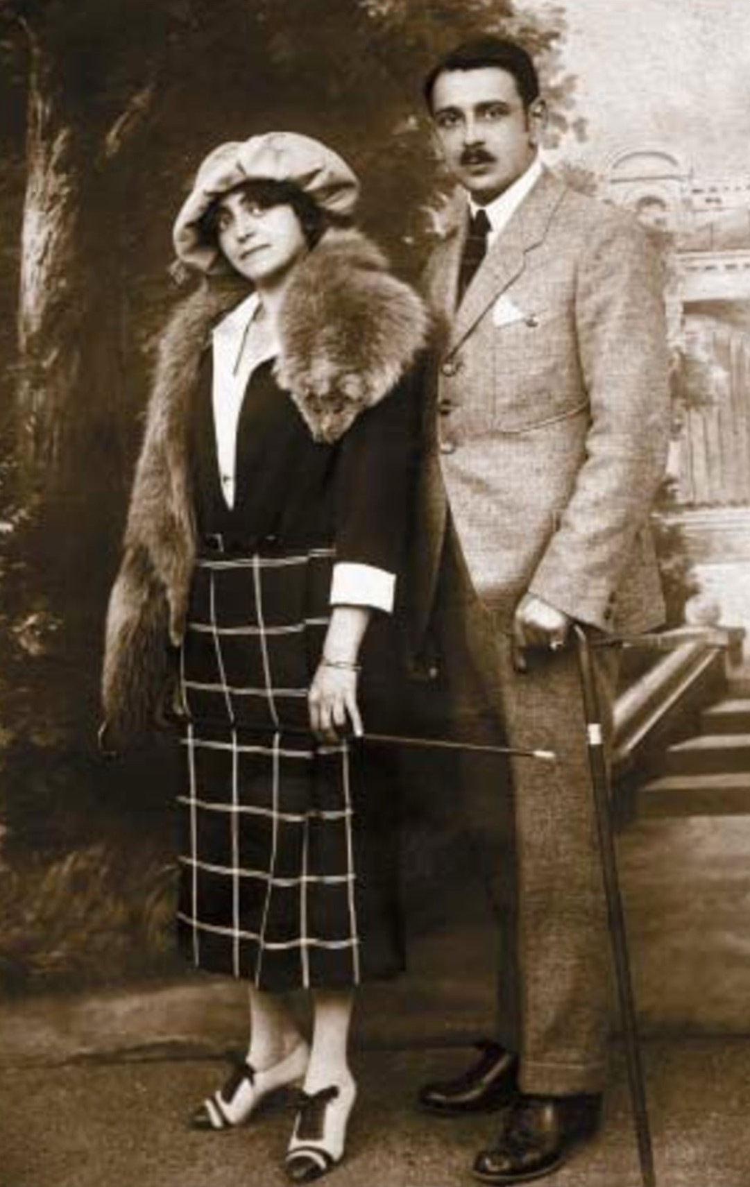 Rudolf Jelínek (1892 - 1944), Český podnikatel.